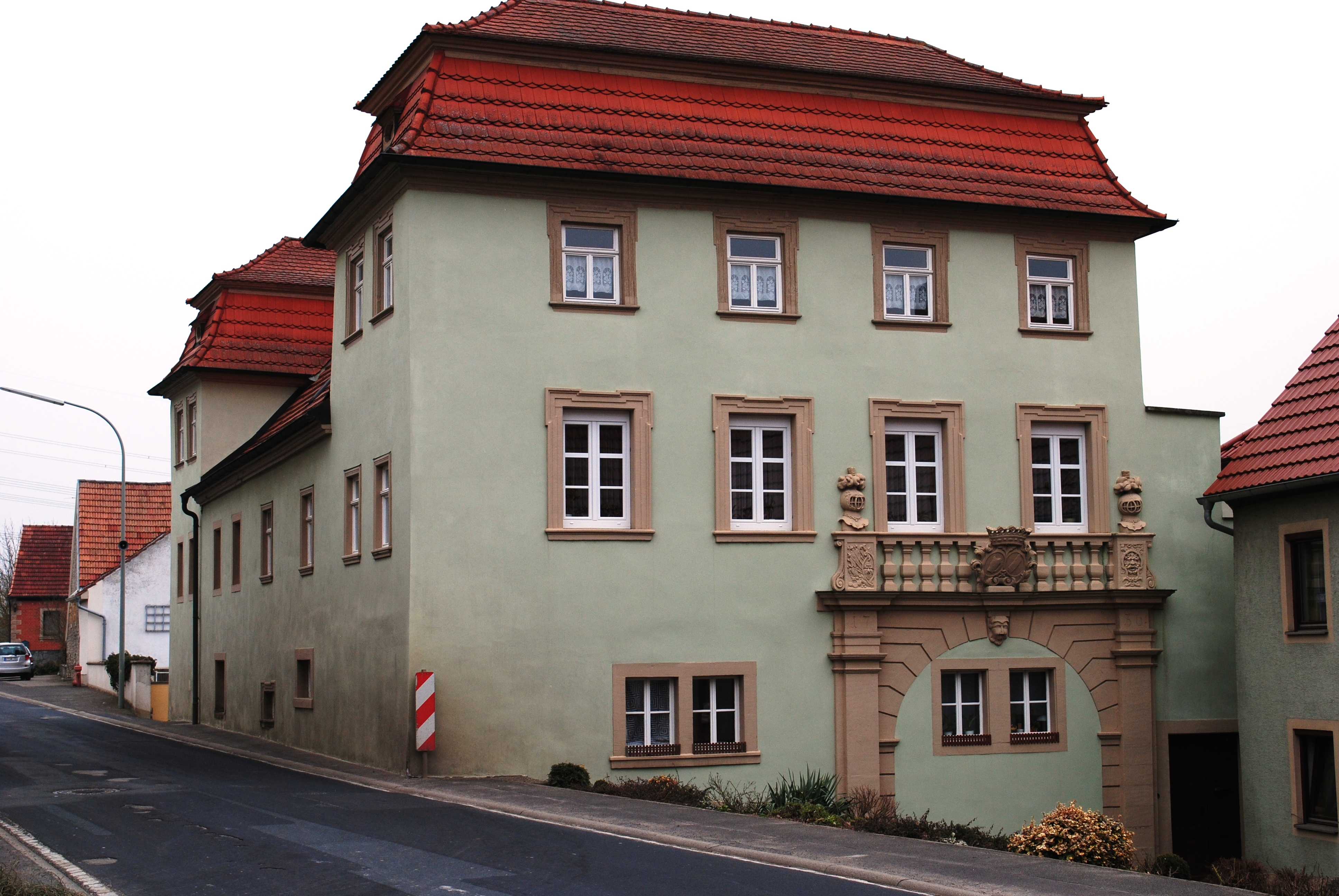 Schloss, Krautheim, Landstraße, Volkach-Krautheim, einfache zweigeschossige Anlage, an den beiden vorderen Ecken ein halbes Geschoss aufgesetzt (verputztes Fachwerk), Mansarddach, zugesetzter Torbogen mit rustiziertem Portal, bez. 1736, über älterem Kern des 15. Jh.